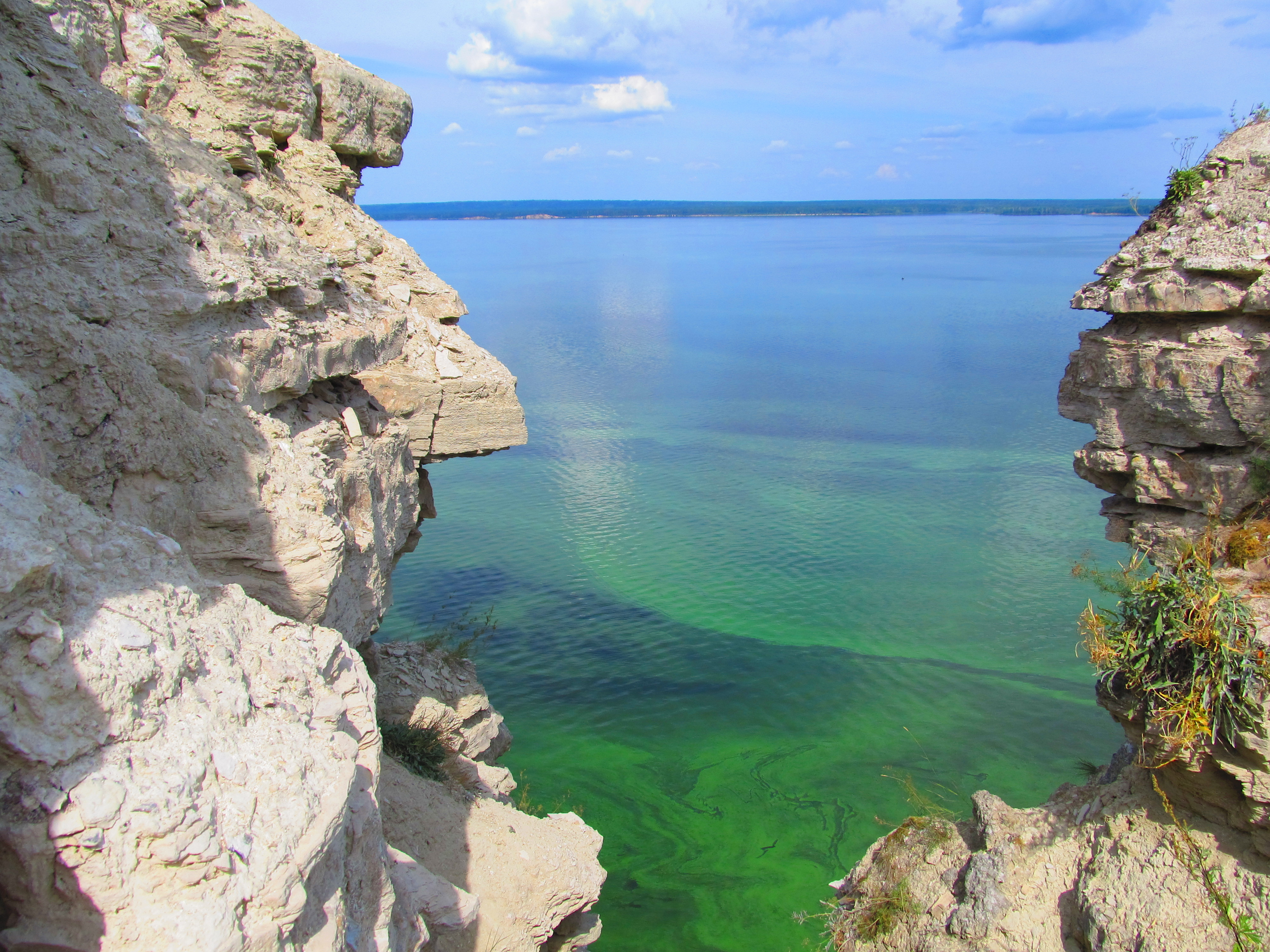 Комплекс спелеосистем, Камско-Устьинский район This image is related to the protected area of Russia number 1610111